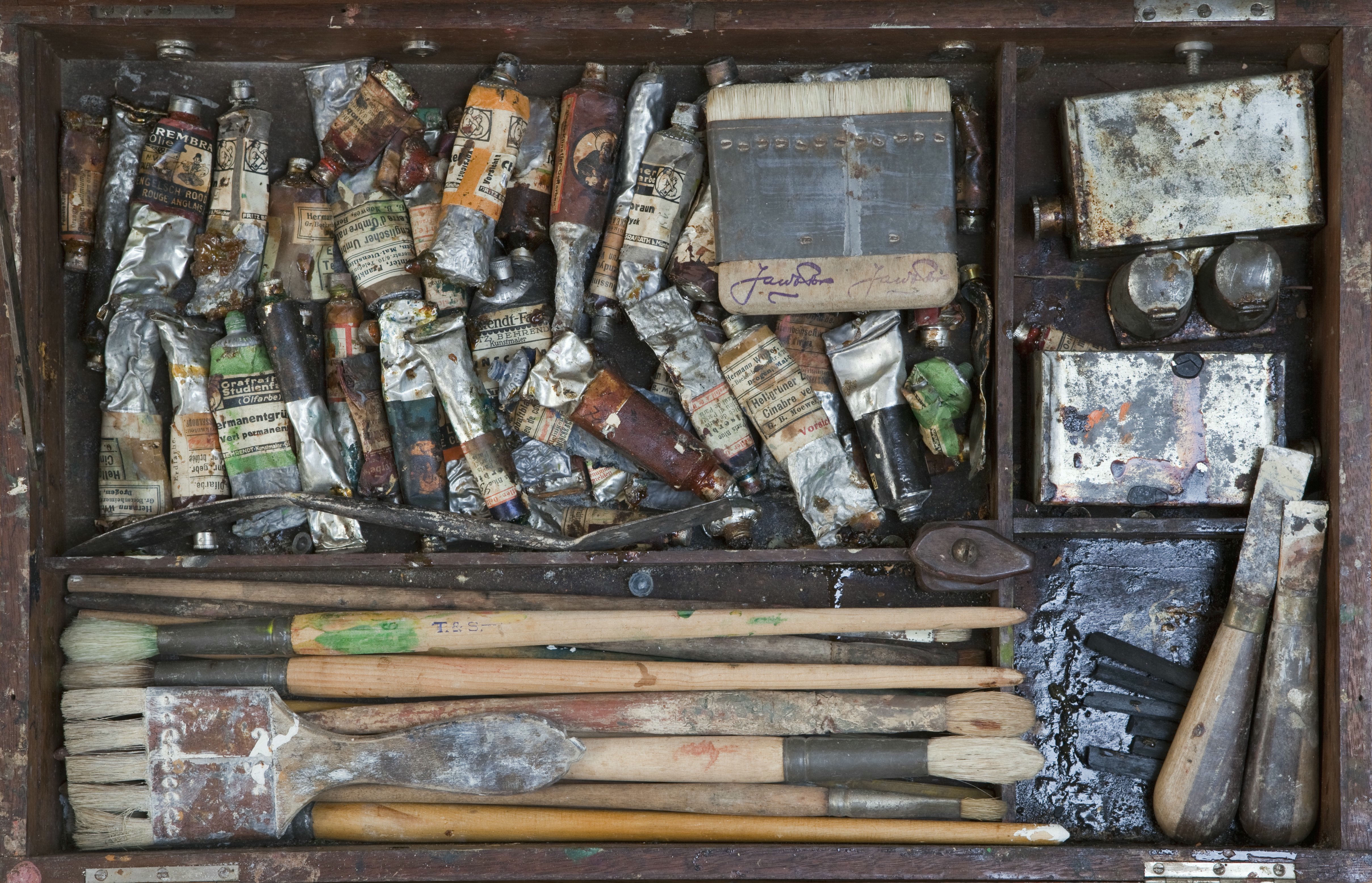 Schilderkist: De schilderkist van Jacob Por, geopend en van bovenaf gezien (opmerking: In 2009 in bezit van familie van Jacob Por)